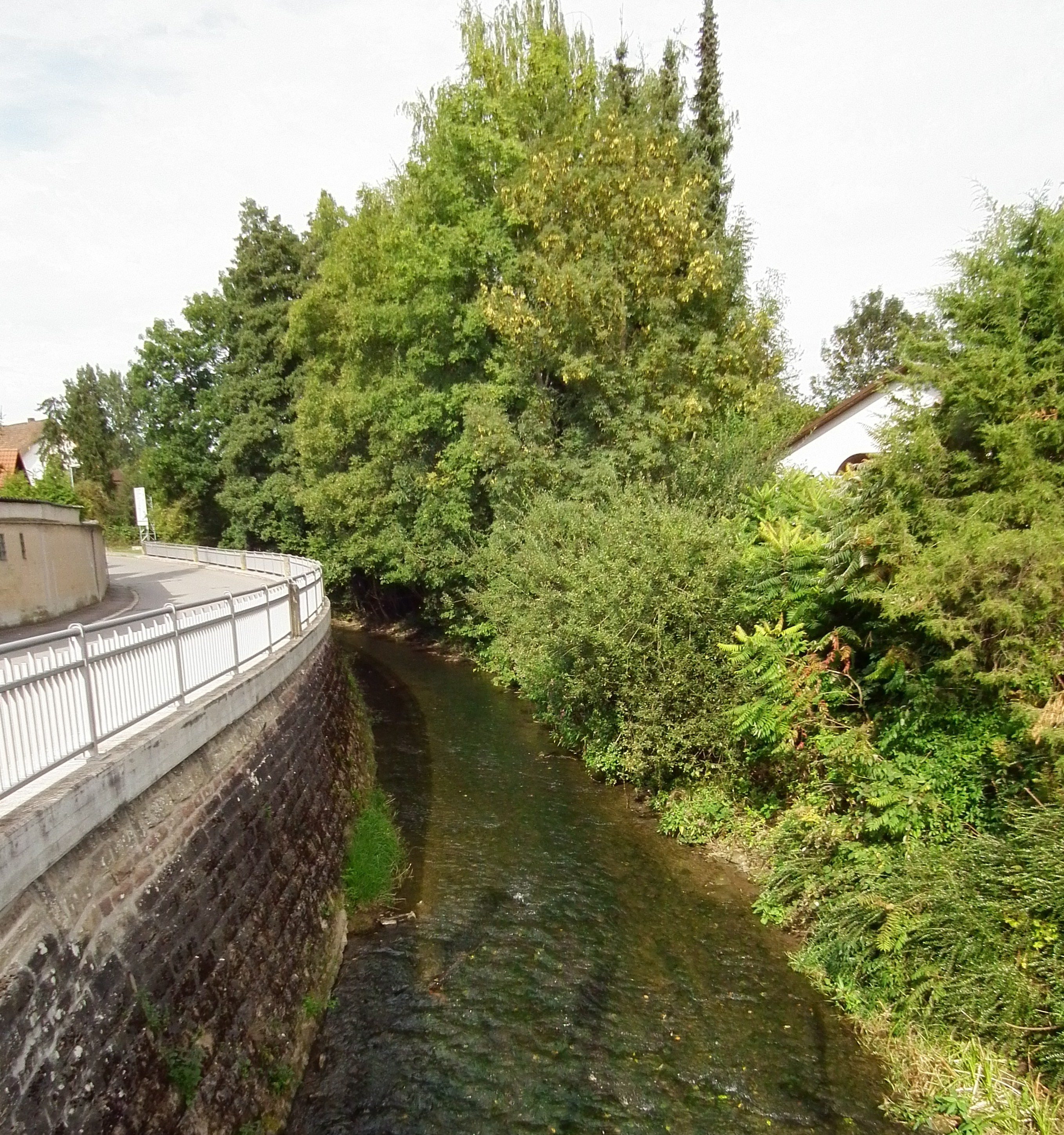 Schwarzbach in Neidenstein (Baden-Württemberg, Deutschland)